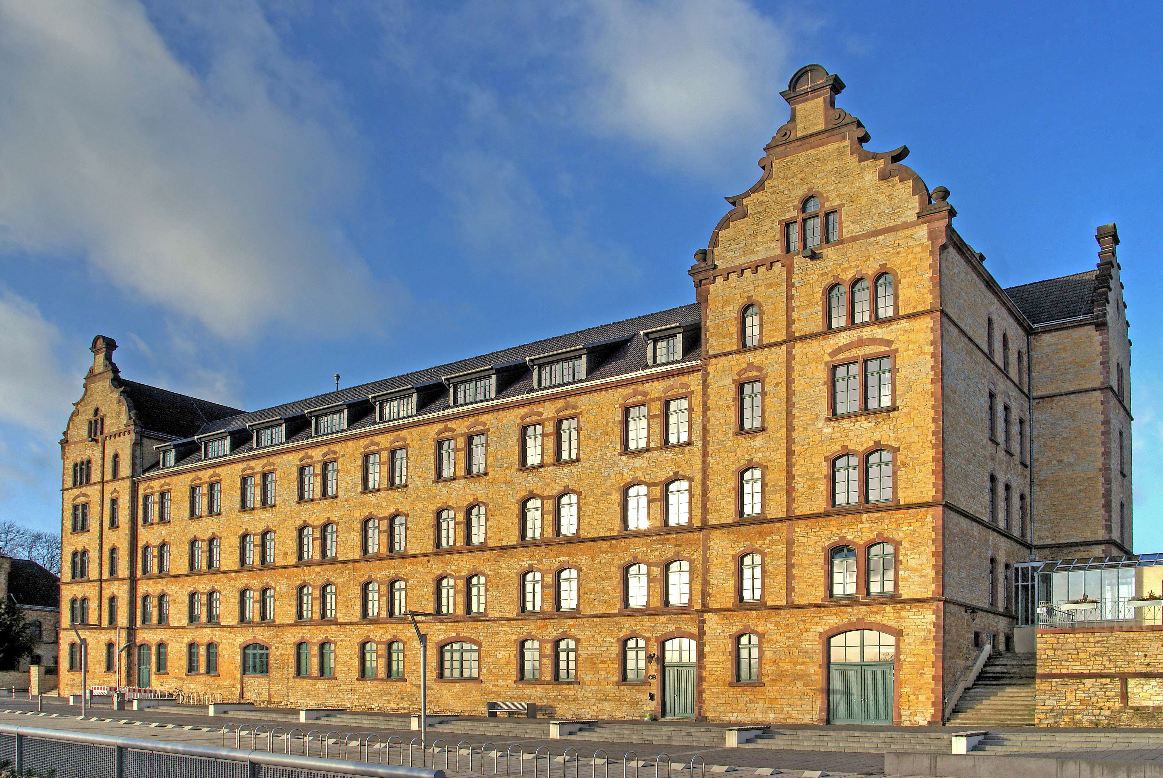 ehemalige Caprivikaserne in Osnabrück